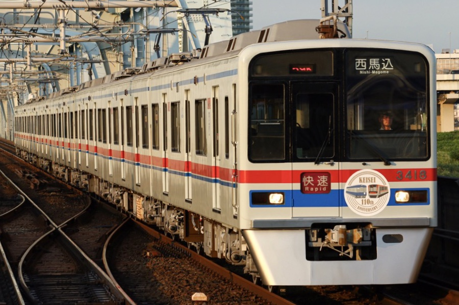 2019年8月10日 京成押上線四ツ木〜八広 快速西馬込ゆき 京成3400形3418編成